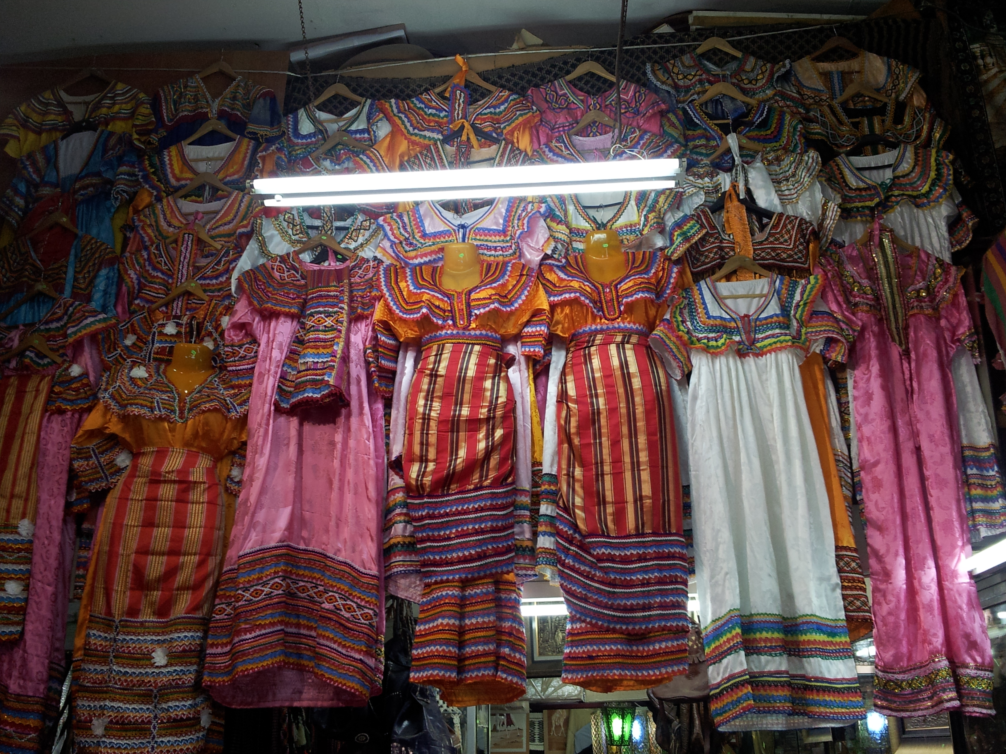 Robes kabyles (Artisanat algérien)